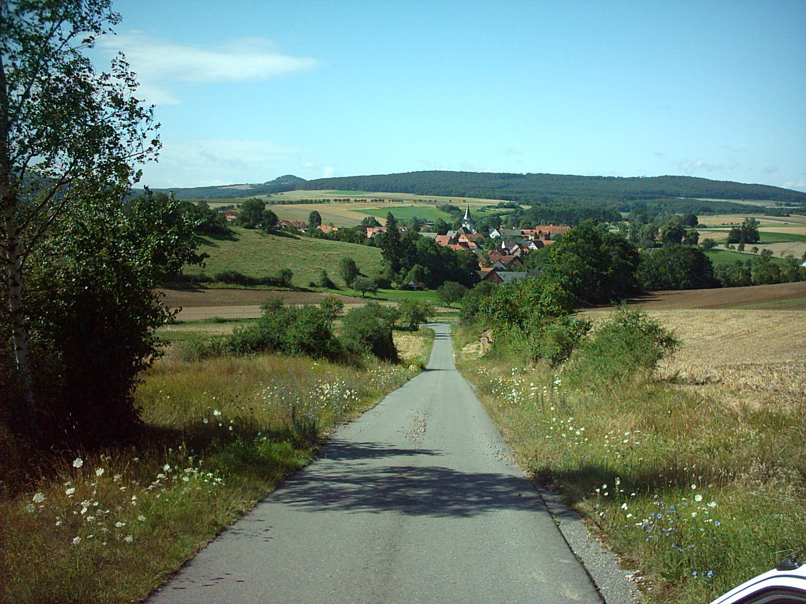 Niedermeiser vom Rosenberg aus gesehen